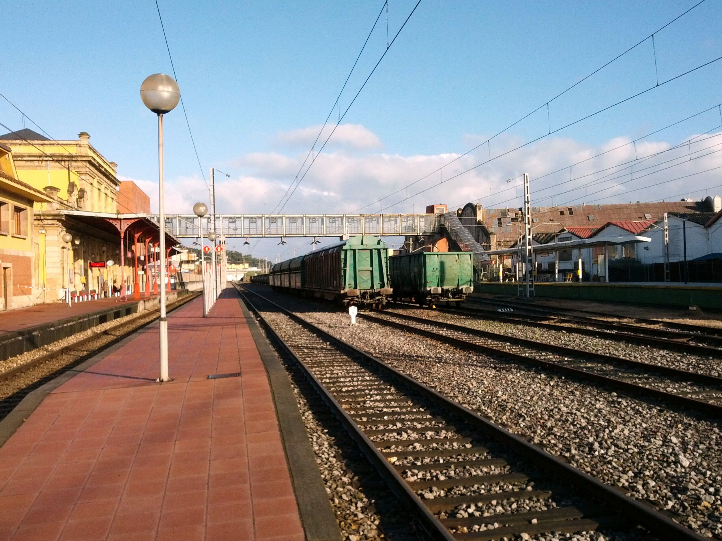 Estación de ferrocarril de Avilés (Asturias), España. A la izquierda de la imagen se observa el edificio de viajeros de ancho ibérico. Tras el se encuentra la estación de autobuses que comunica con los andenes de vía estrecha, a la derecha de la imagen.